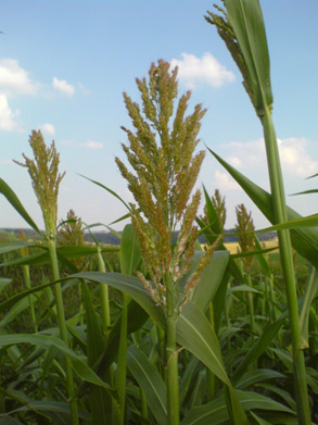 Rispe einer Zuckerhirsenpflanze